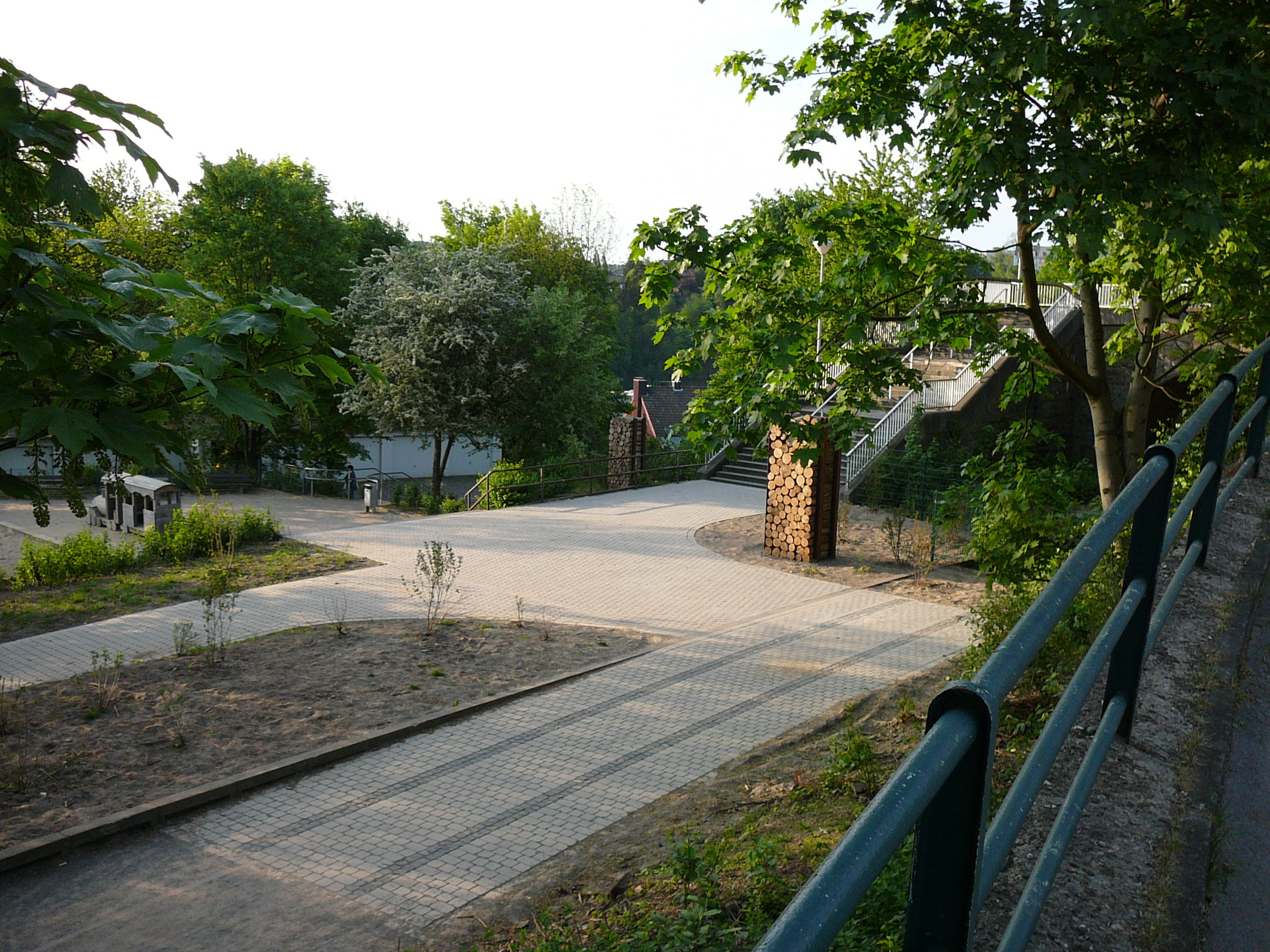 Historischer Haltepunkt Wuppertal-Hindenburgstr